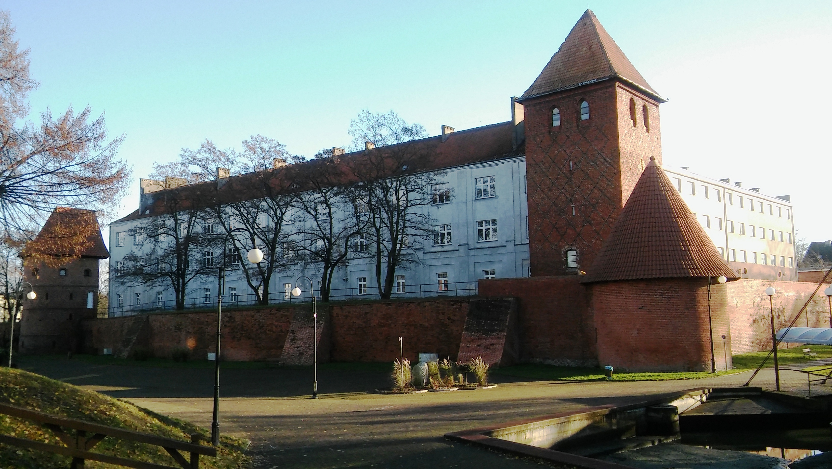 Kolegium Jezuitów w Braniewie (Collegium Hosianum), Wieża Klesza